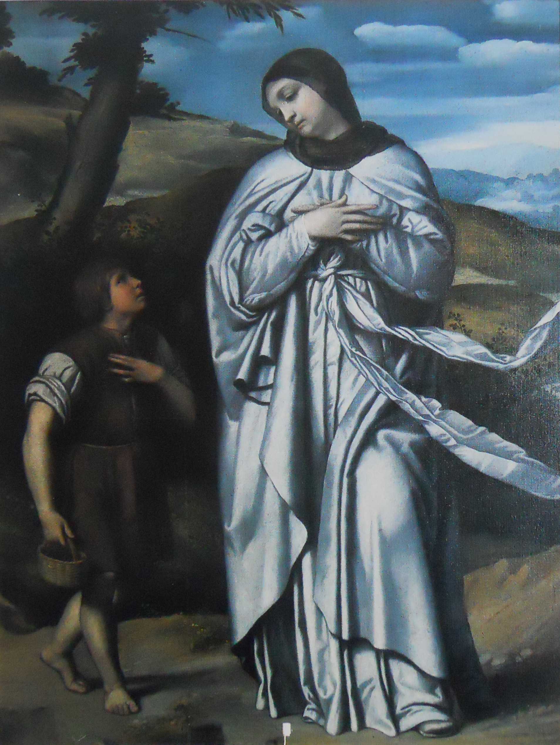 Apparizione della Madonna al sordomuto Filippo Viotti